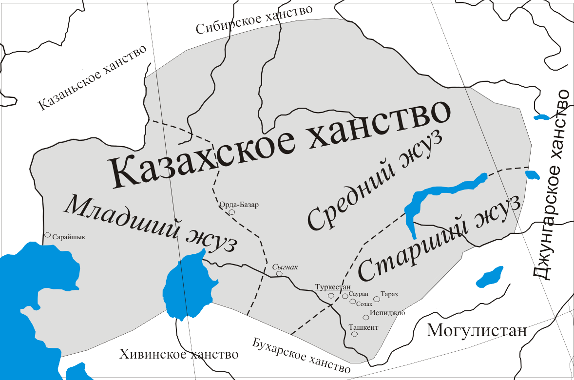 Карта Казахского ханство